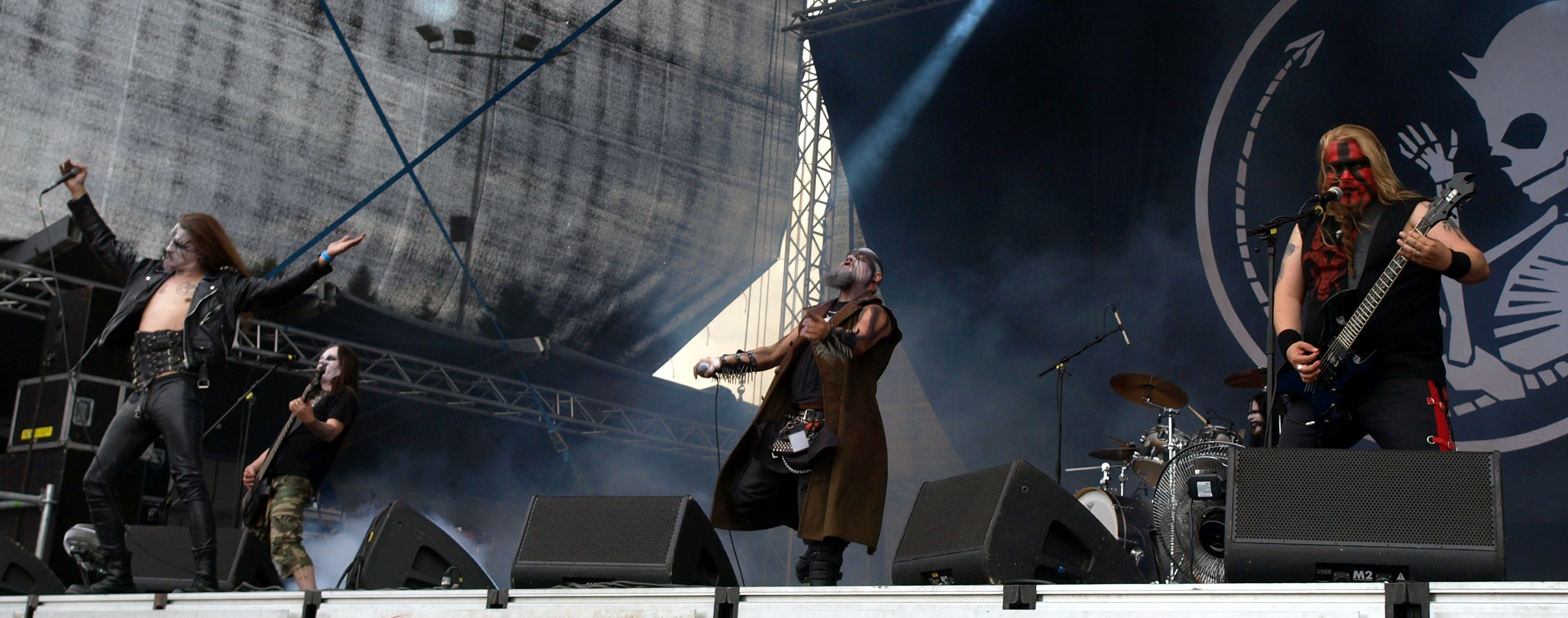 Turmion Kätilöt live am Myötätuulirock 2011